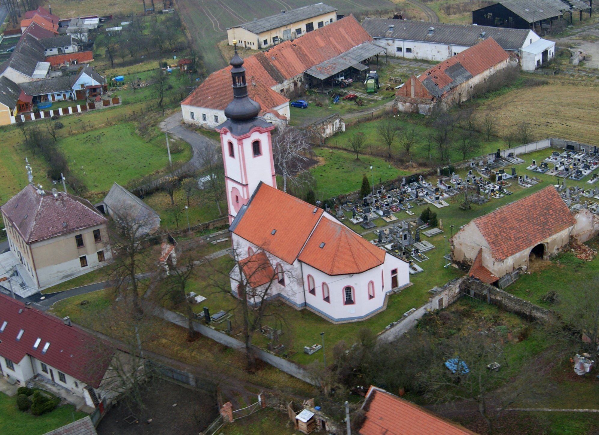 Kostel sv. Václava (Dráchov), Dráchov